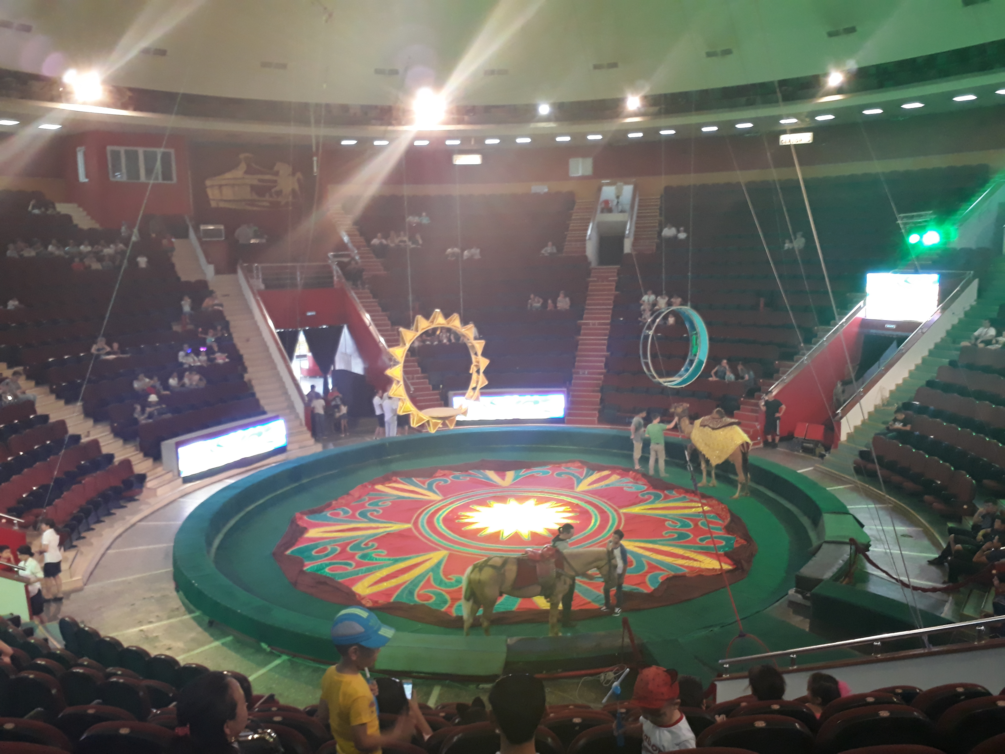 Алматинский цирк, интерьер зала, май 2018